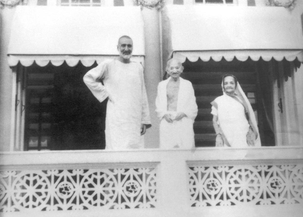 Abdul Ghaffar Khan and Mohandas Gandhi.